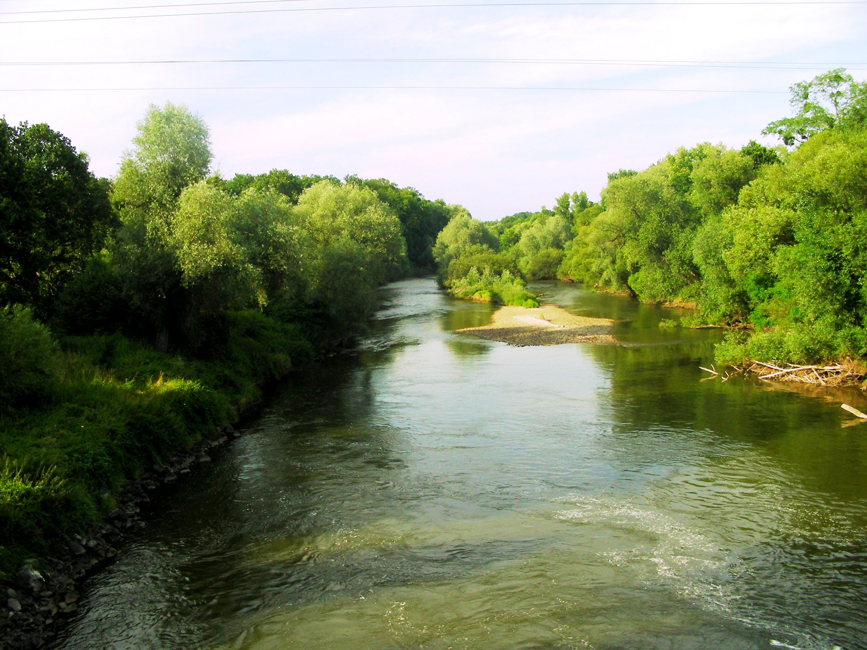 Nysa Kłodzka w pobliżu rezerwatu. Rezerwat przyrody Dębina, gmina Grodków, województwo Opolskie, Polska